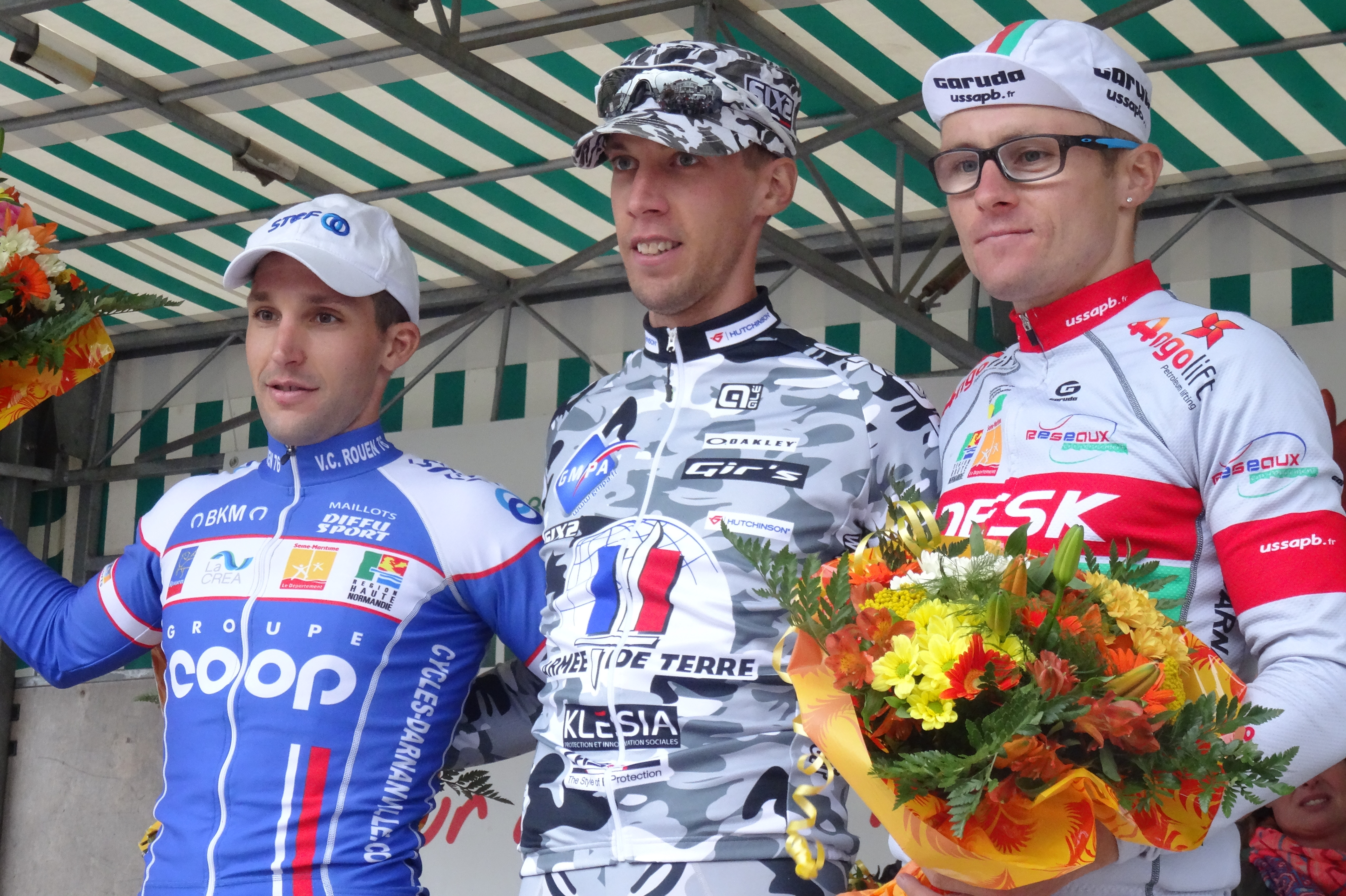 Reportage photographique réalisé le dimanche 17 août à l'occasion du départ et de l'arrivée du Grand Prix de Bavay 2014 à Bavay, Nord, Nord-Pas-de-Calais, France.